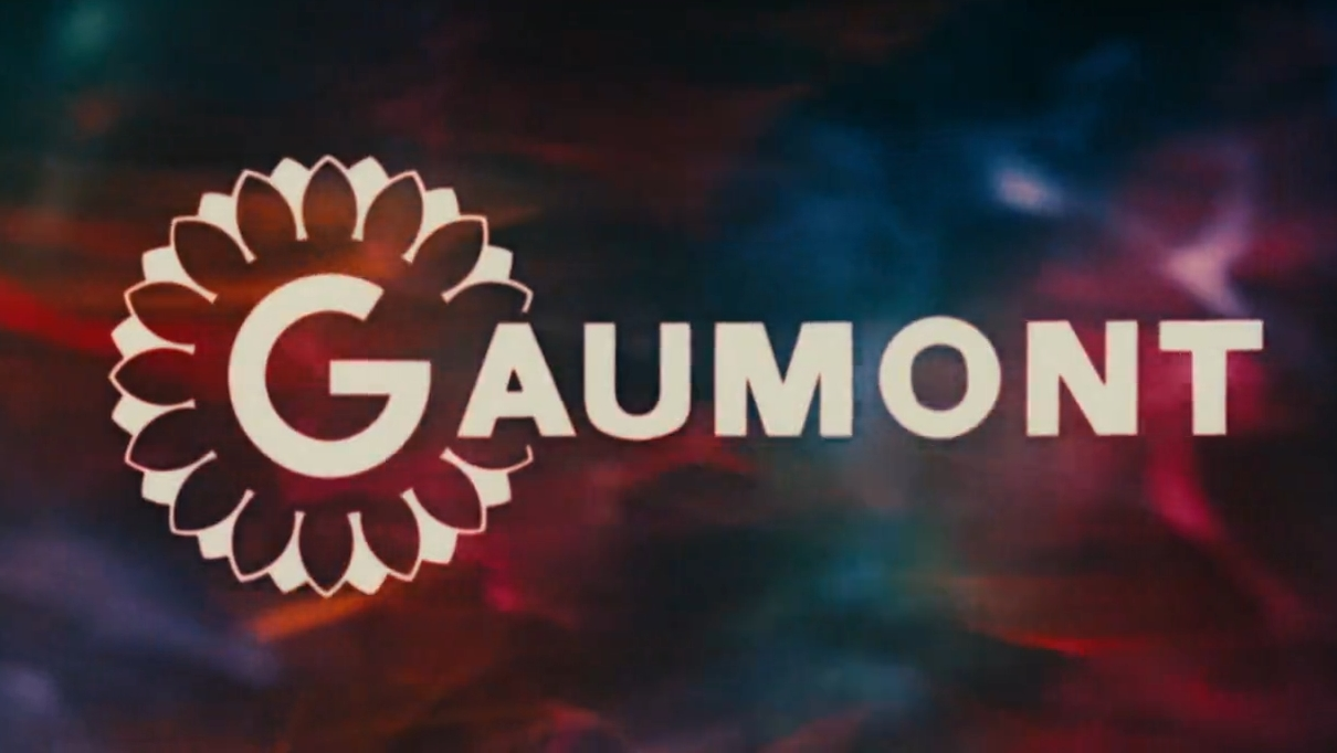 Logo de la compagnie Gaumont de 1970 à 1980.